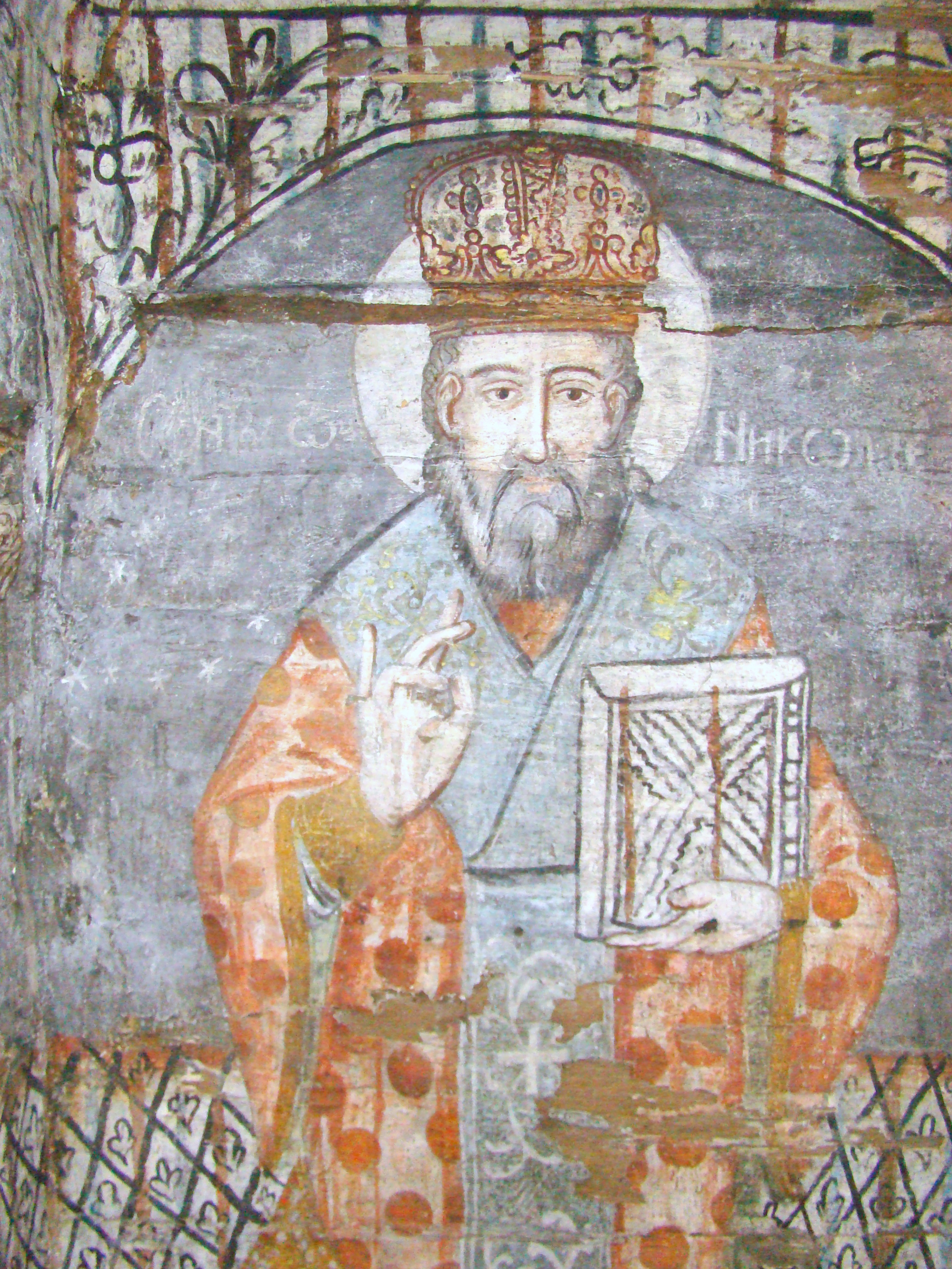 Biserica de lemn din Racâș, județul Sălaj